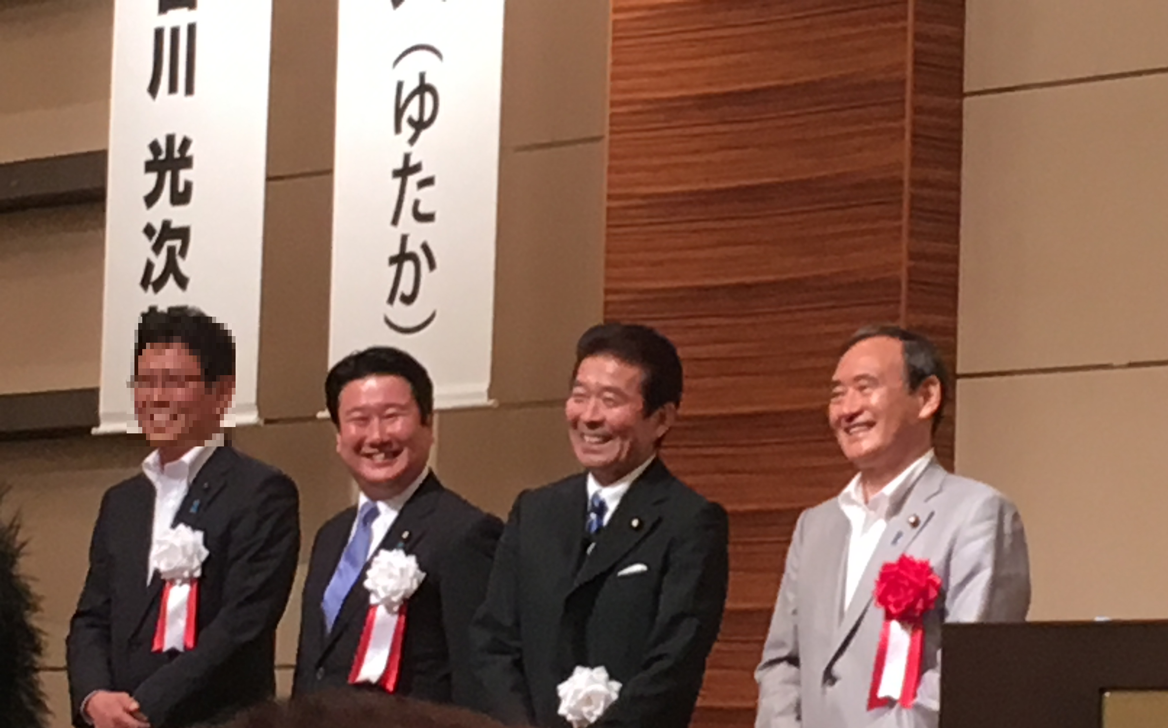 菅義偉、中野正志、和田政宗。2016年7月4日、第24回参議院議員選挙宮城選挙区の自民党・日本のこころを大切にする党合同演説会にて。